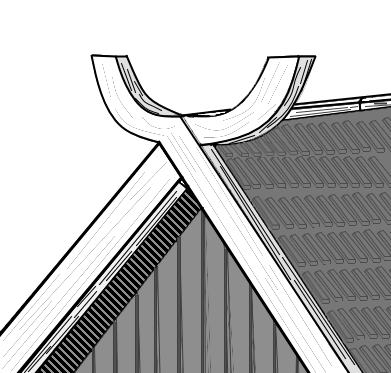 Décoration de pignon en forme de corne, site de Trelleborg.